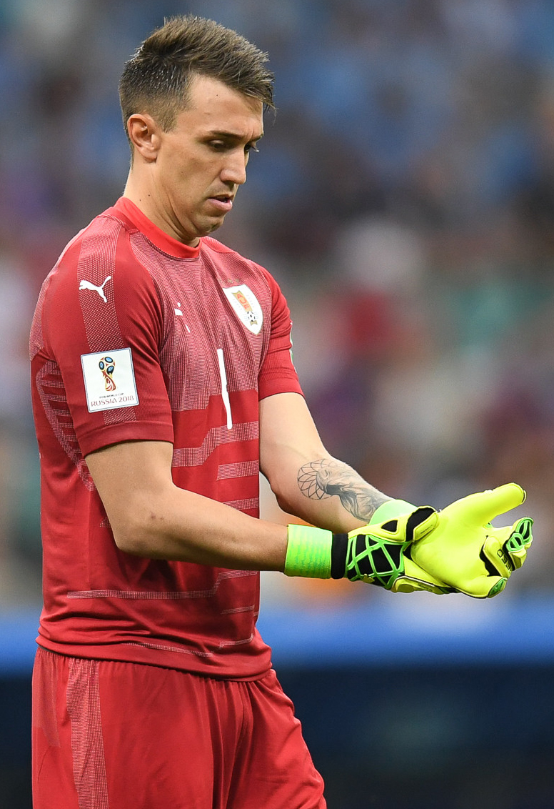 День, когда Роналду попрощался с ЧМ. Кавани и Суарес идут дальше